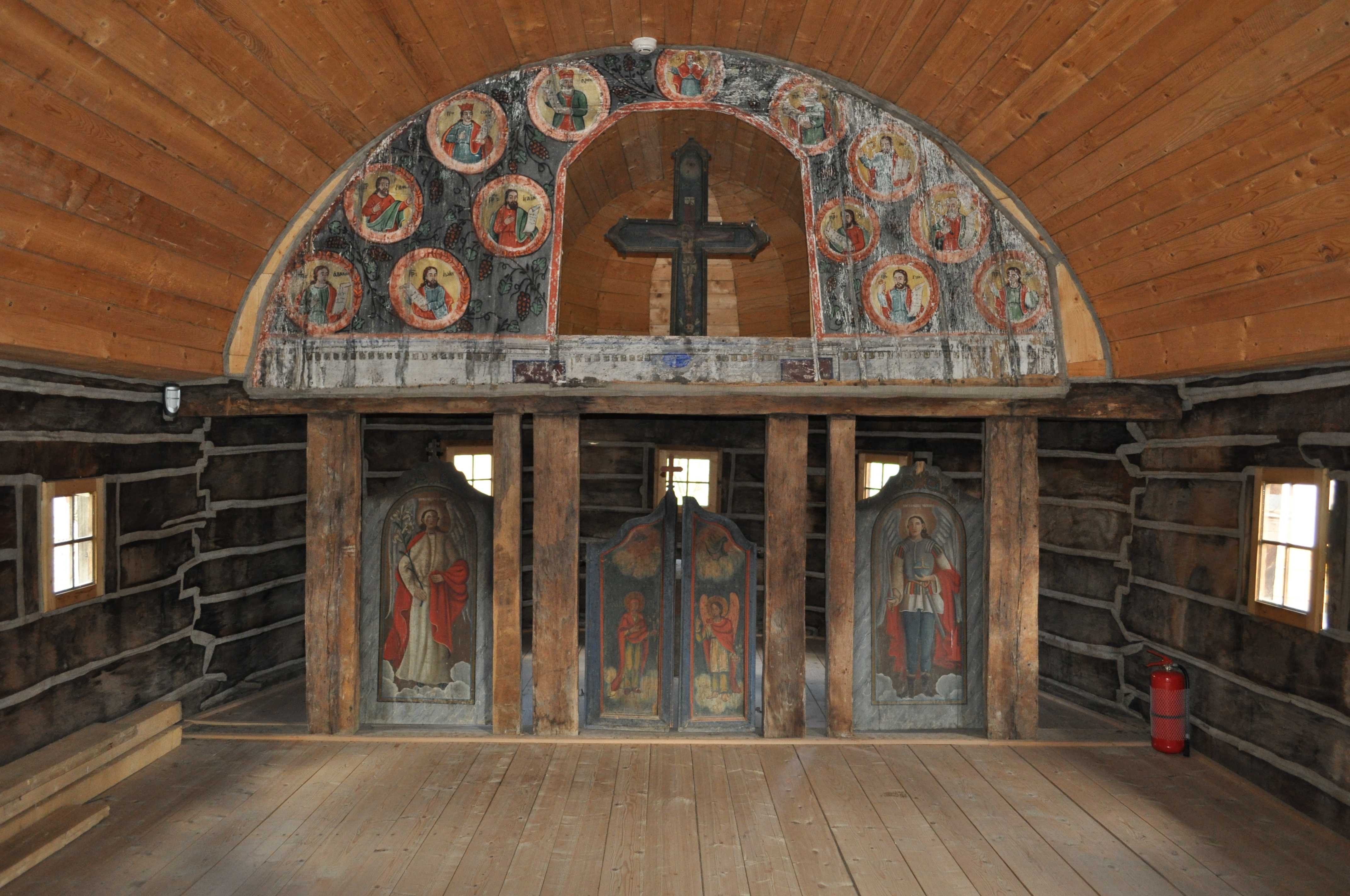 Biserica de lemn "Întâmpinarea Domnului", sat GROŞII NOI; comuna BÂRZAVA